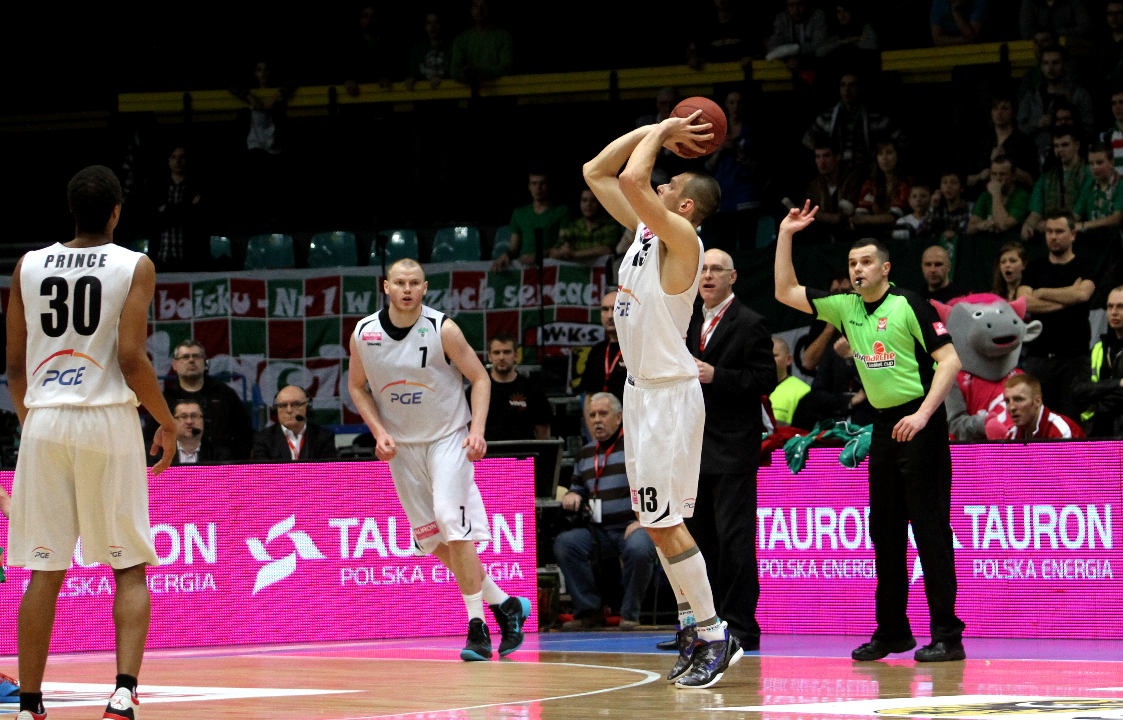 J.P. Prince, PGE Turów Zgorzelec, Damian Kulig, PGE Turów Zgorzelec, Filip Dylewicz, PGE Turów Zgorzelec